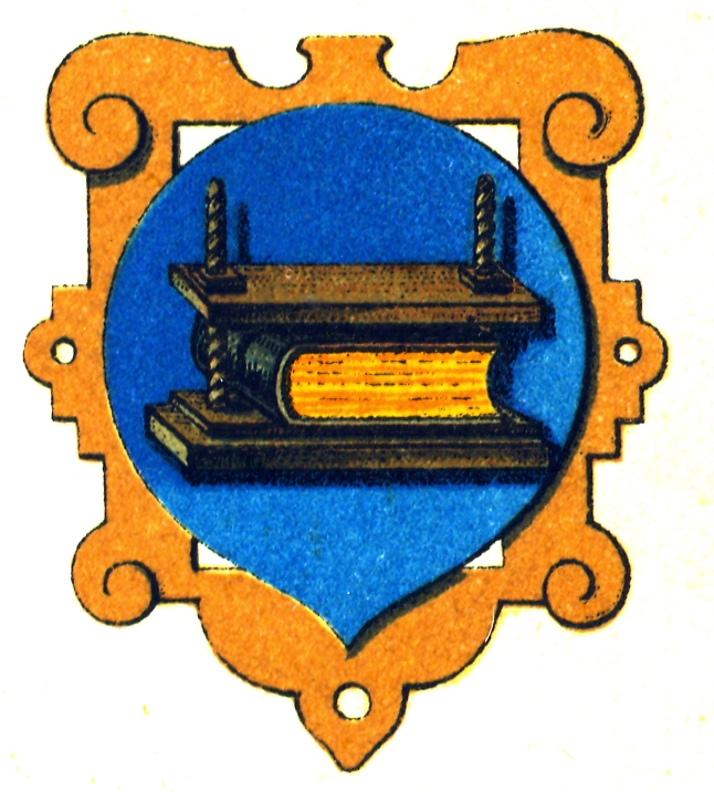 Zunftwappen Buchbinder